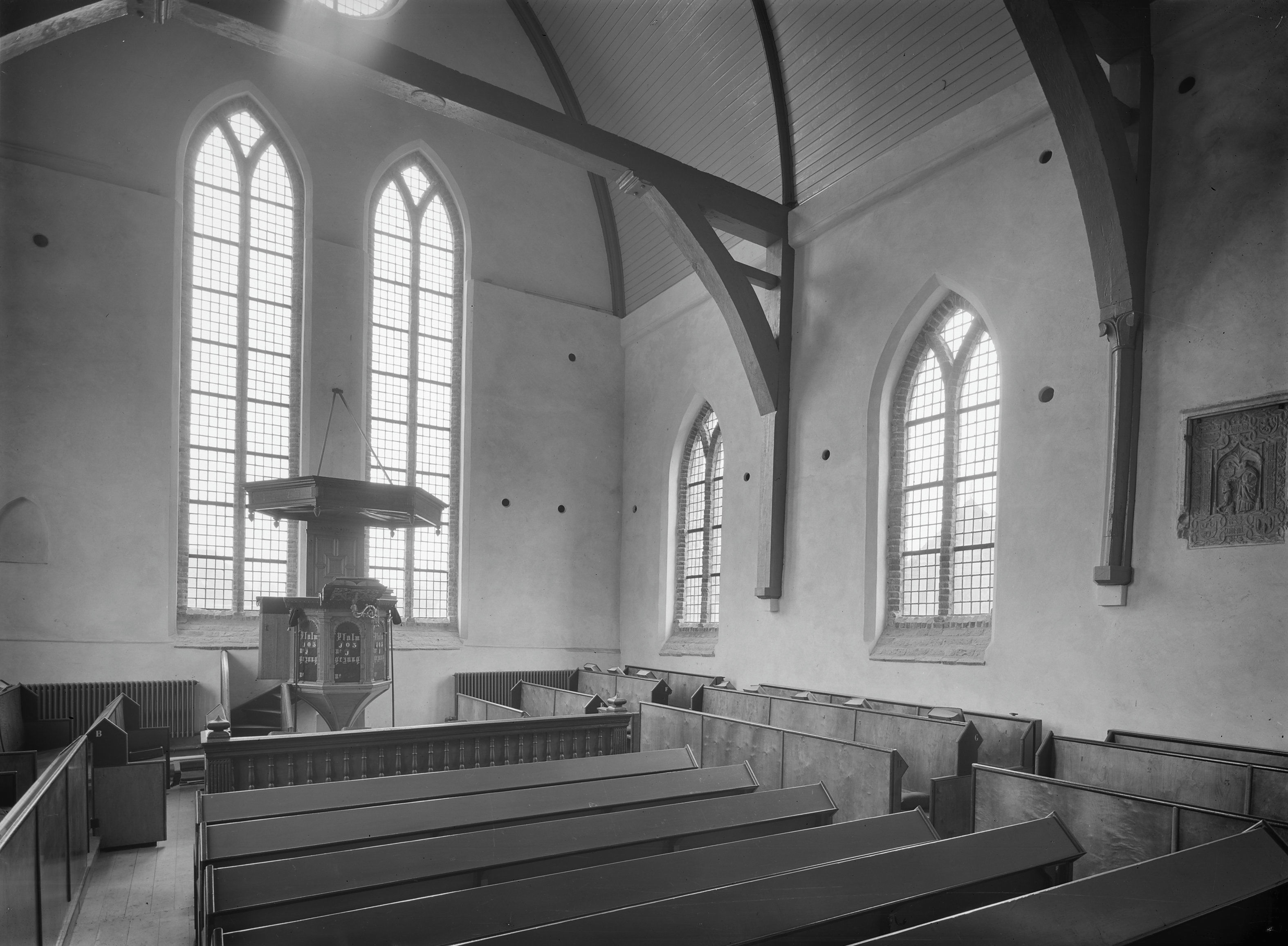 Nederlands Hervormde Kerk: Interieur naar het zuidoosten gezien, na de restauratie